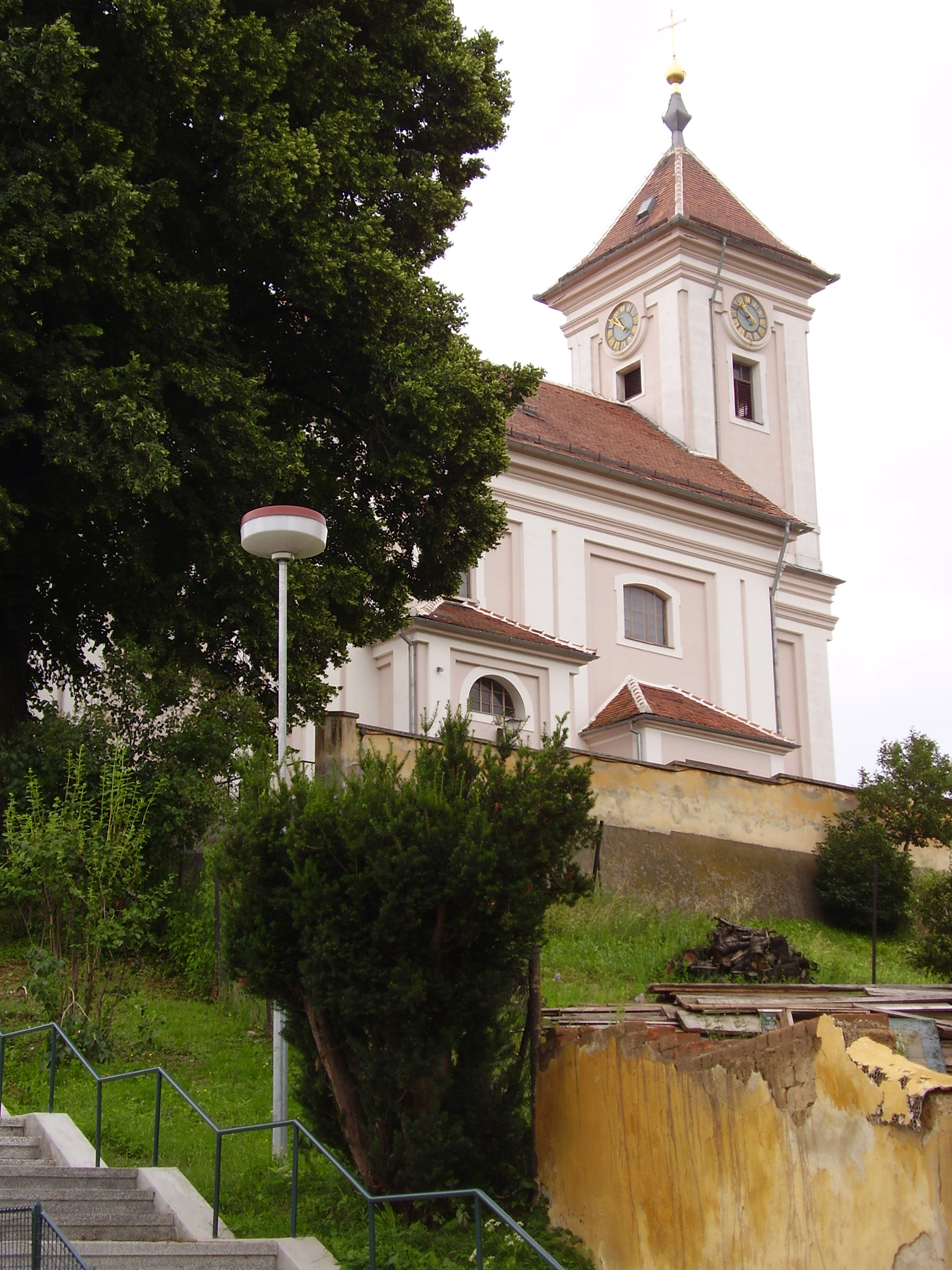 Kostel sv. Mikuláše s kaplí Bolestné Panny Marie a sochou sv. Josefa (Letonice), Letonice